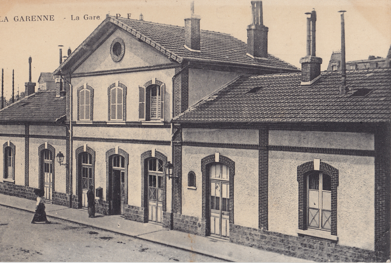 Carte postale ancienne éditée par P.F. : LA GARENNE - La Gare